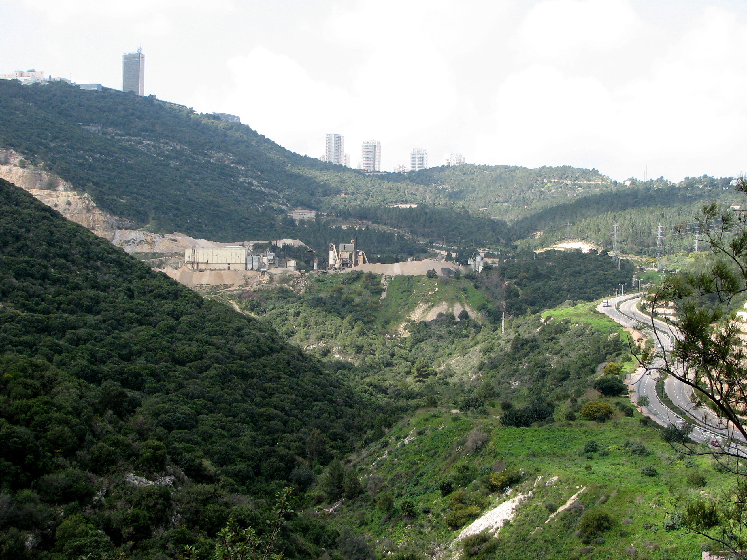 Nesher Nesher The City Nesher on Mount Carmel and Suburb:Givat Nesher תמונות משכונותיה של העיר נשר, גבעת נשר, כביש 705 נחל נשר המחצבה ליד בית הקברות של נשר , ארבעת המגדלים של שכונת "קדמת דניה" השייכת לעיר נשר ובנין המגדל באוניברסיטת חיפה